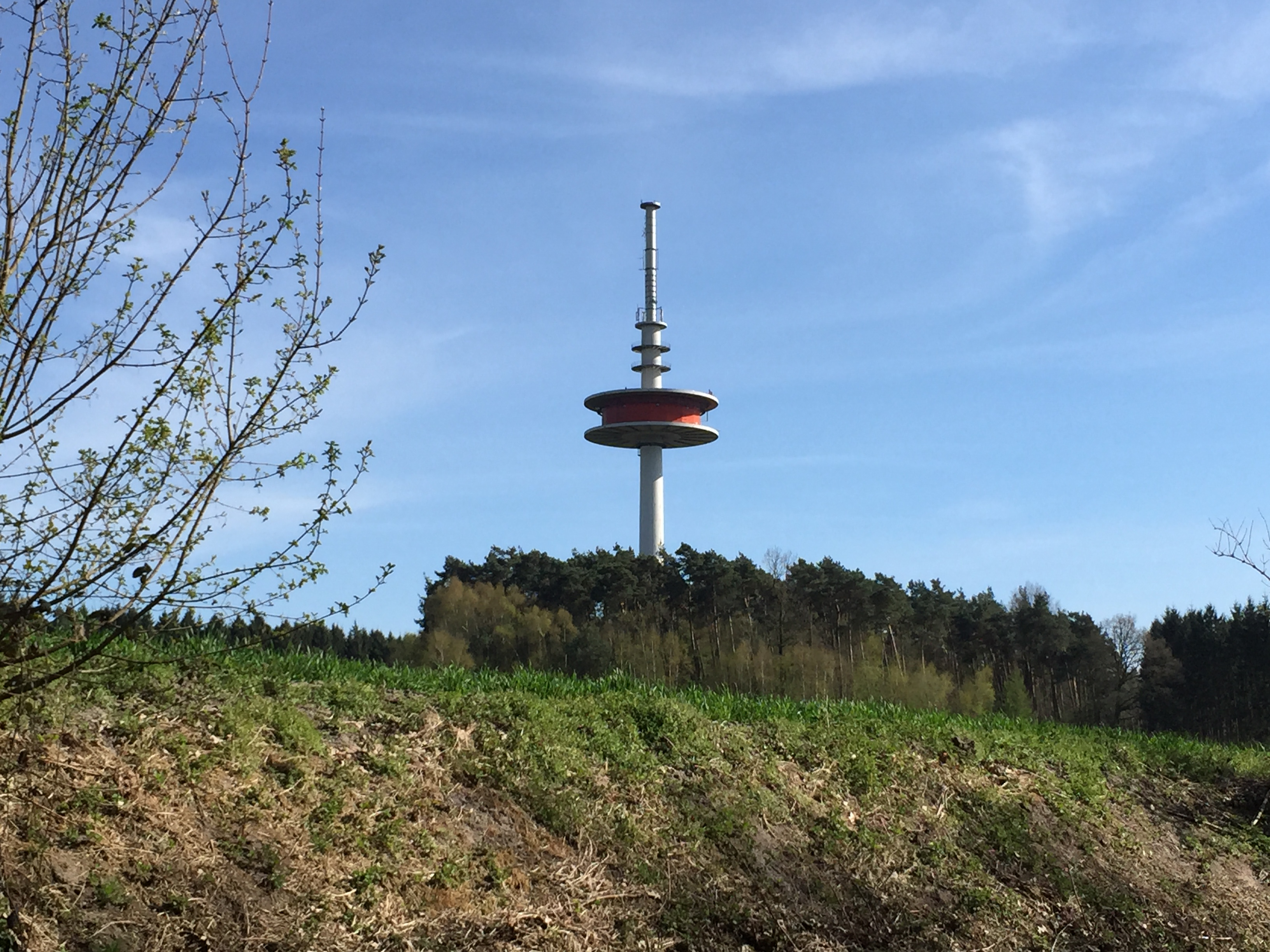 FMT Damme